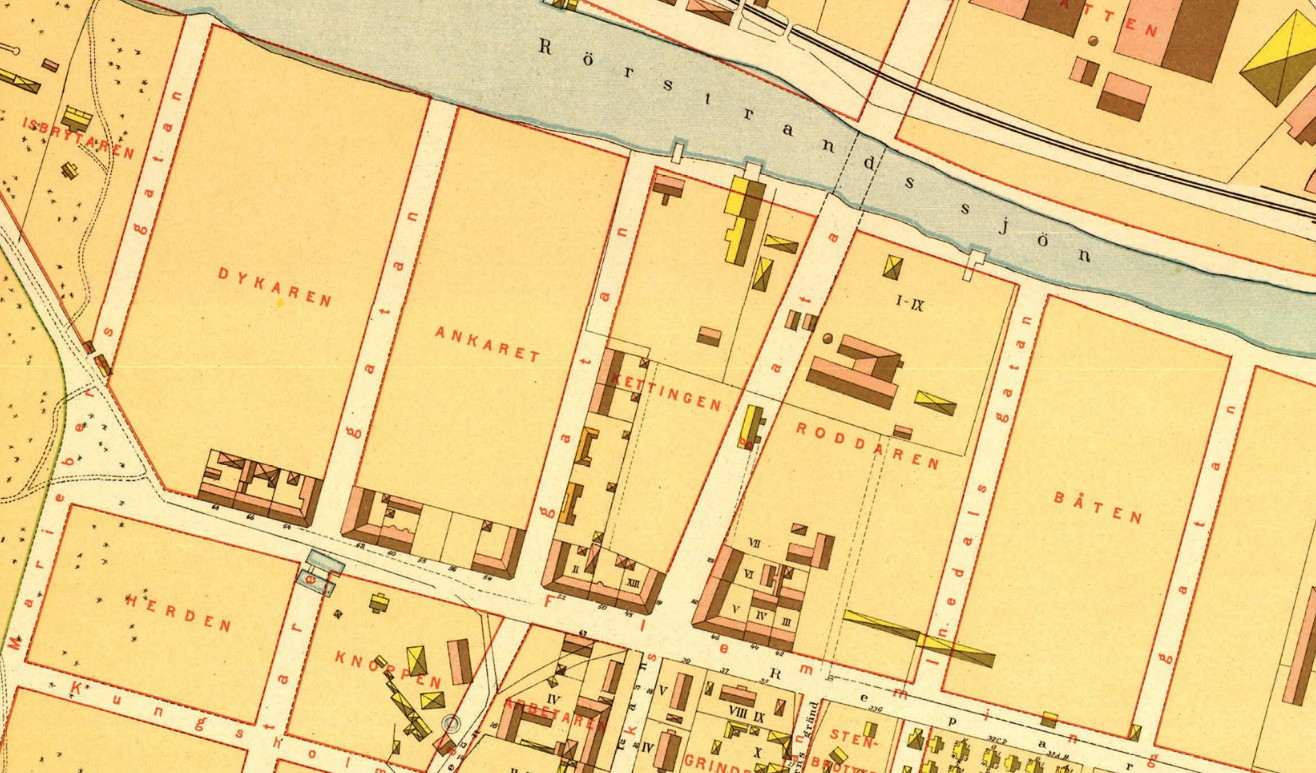 Del av Alfred Rudolf Lundgrens Stockholmskarta visande kvarteren Dykaren, Ankaret, Kettingen m.fl.